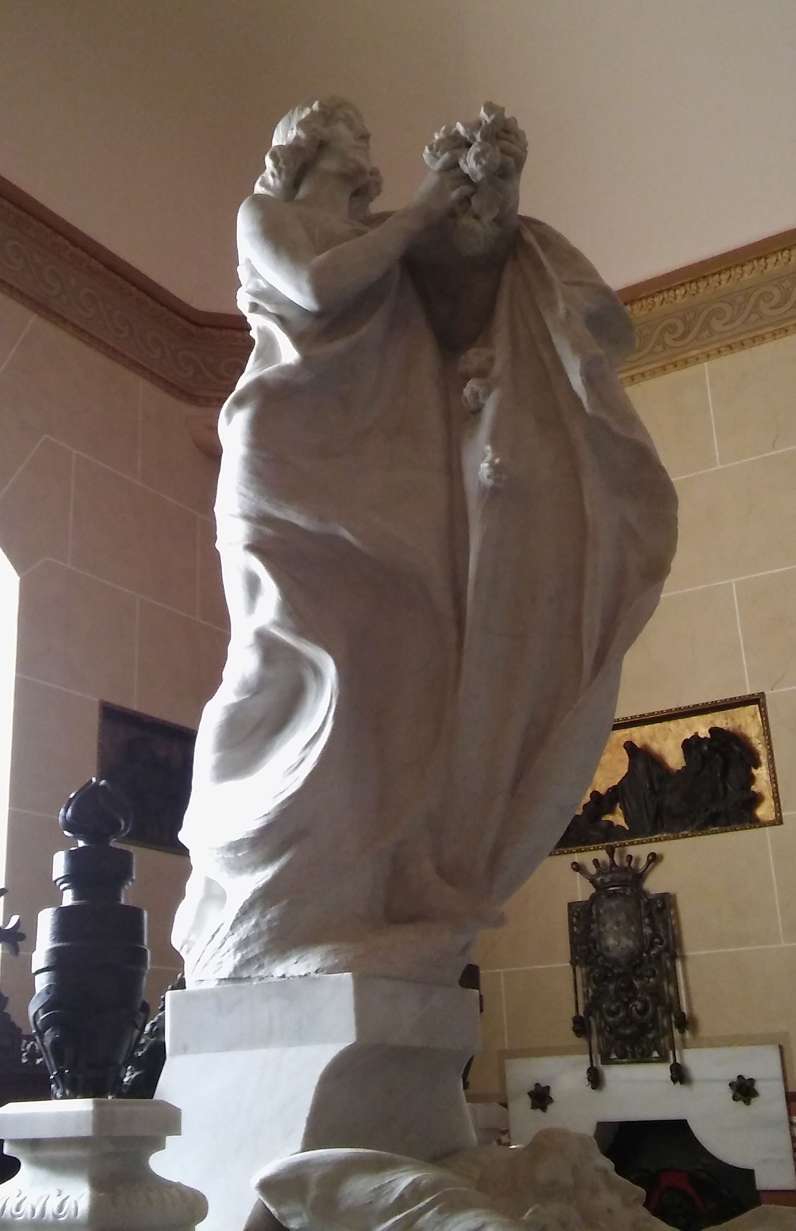 Escultura hiperrealista en actitud de ofrecimiento. Alegoría de la entrega de la vida con las manos llenas de buenas obras.